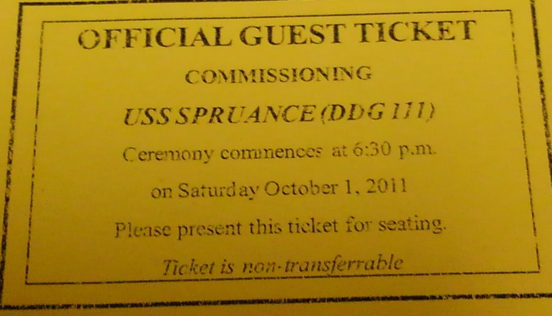 2011年10月1日に開催された駆逐艦スプルーアンスの就役記念式典の入場チケット